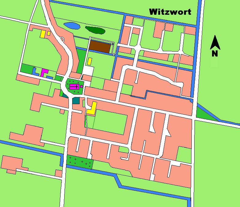 zeigt den Ortskern von Witzwort